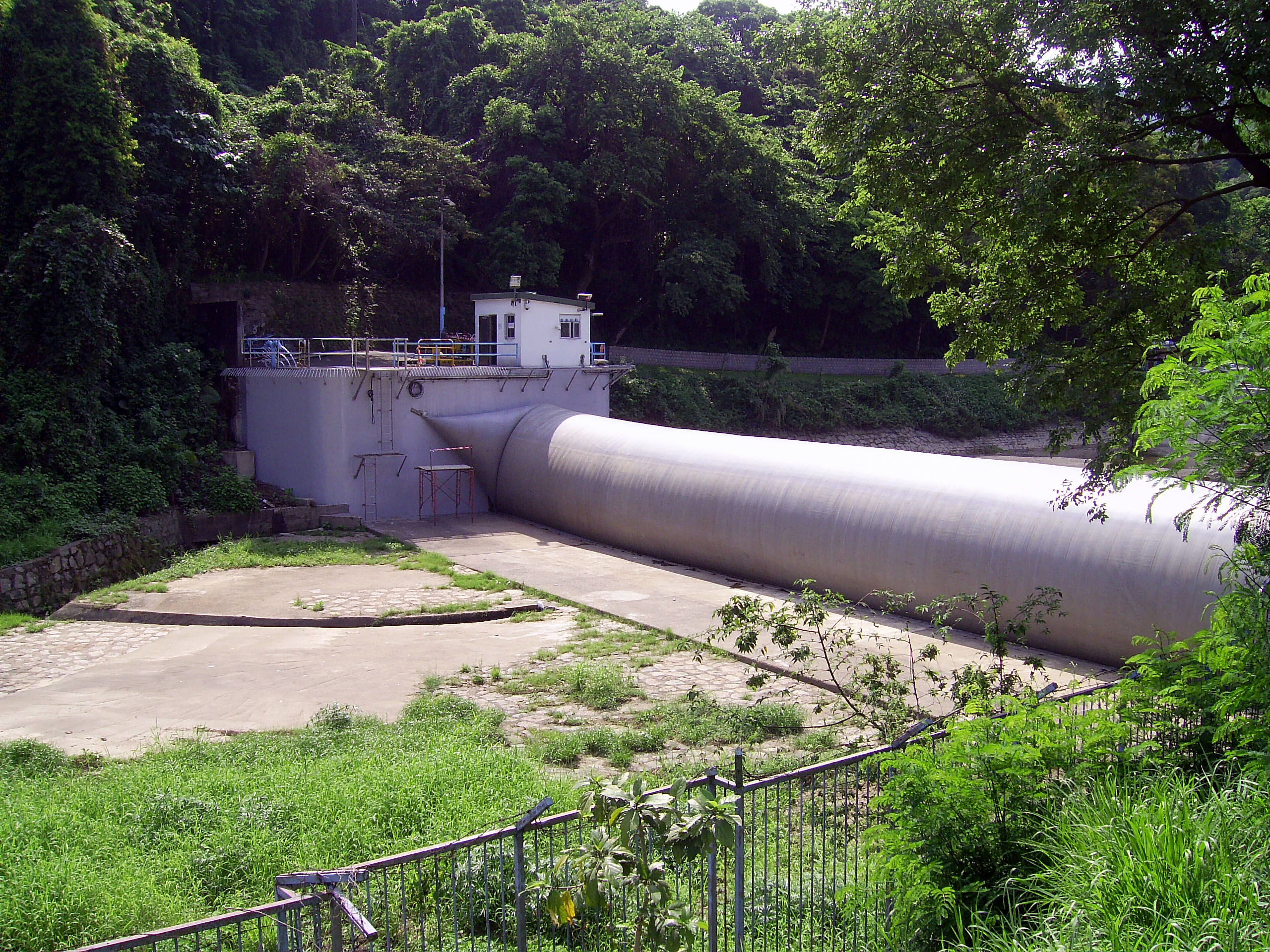 中文（香港）: 林村河上的充氣水壩